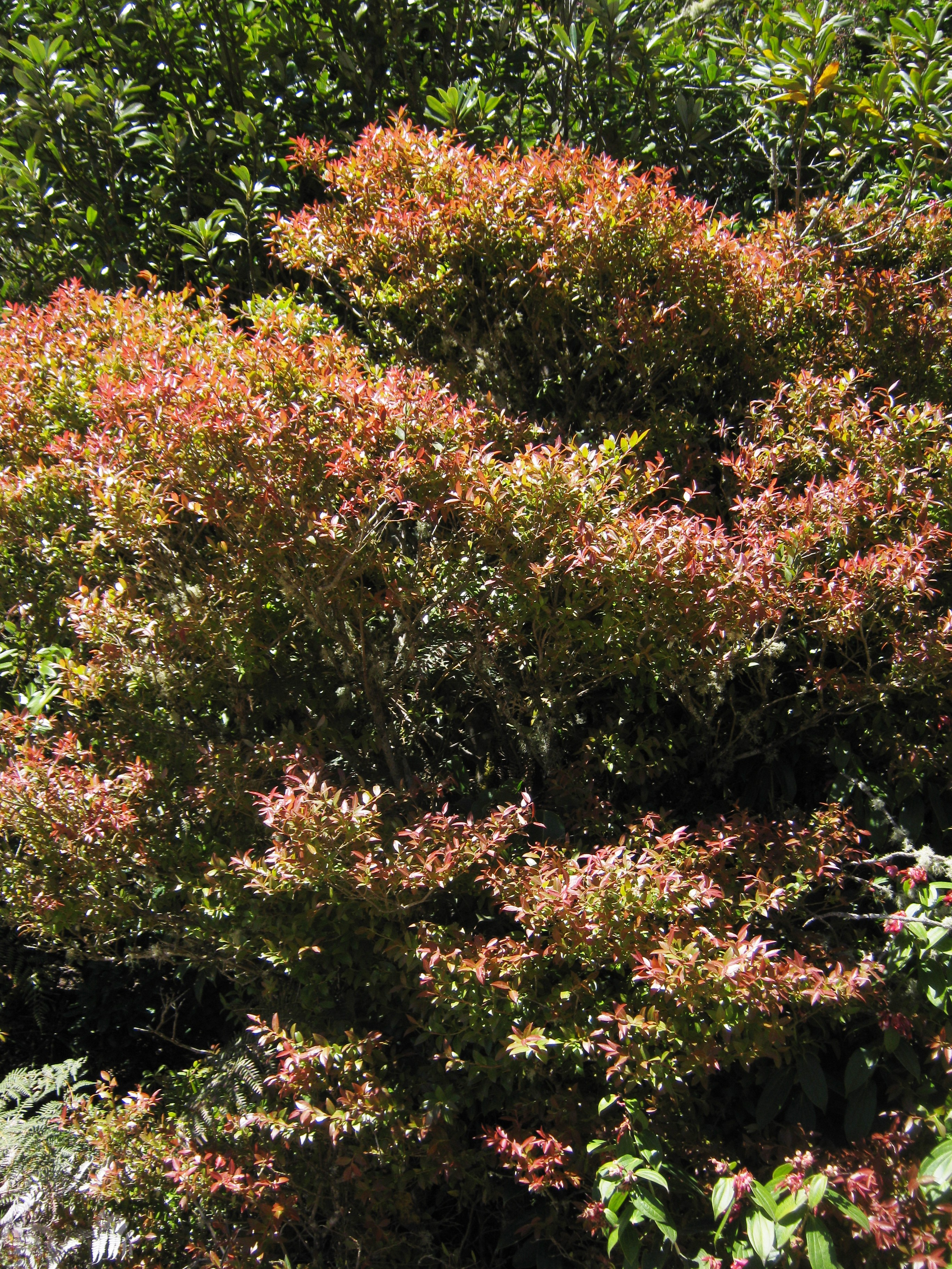 Fotos tomadas en trinidad, Dota